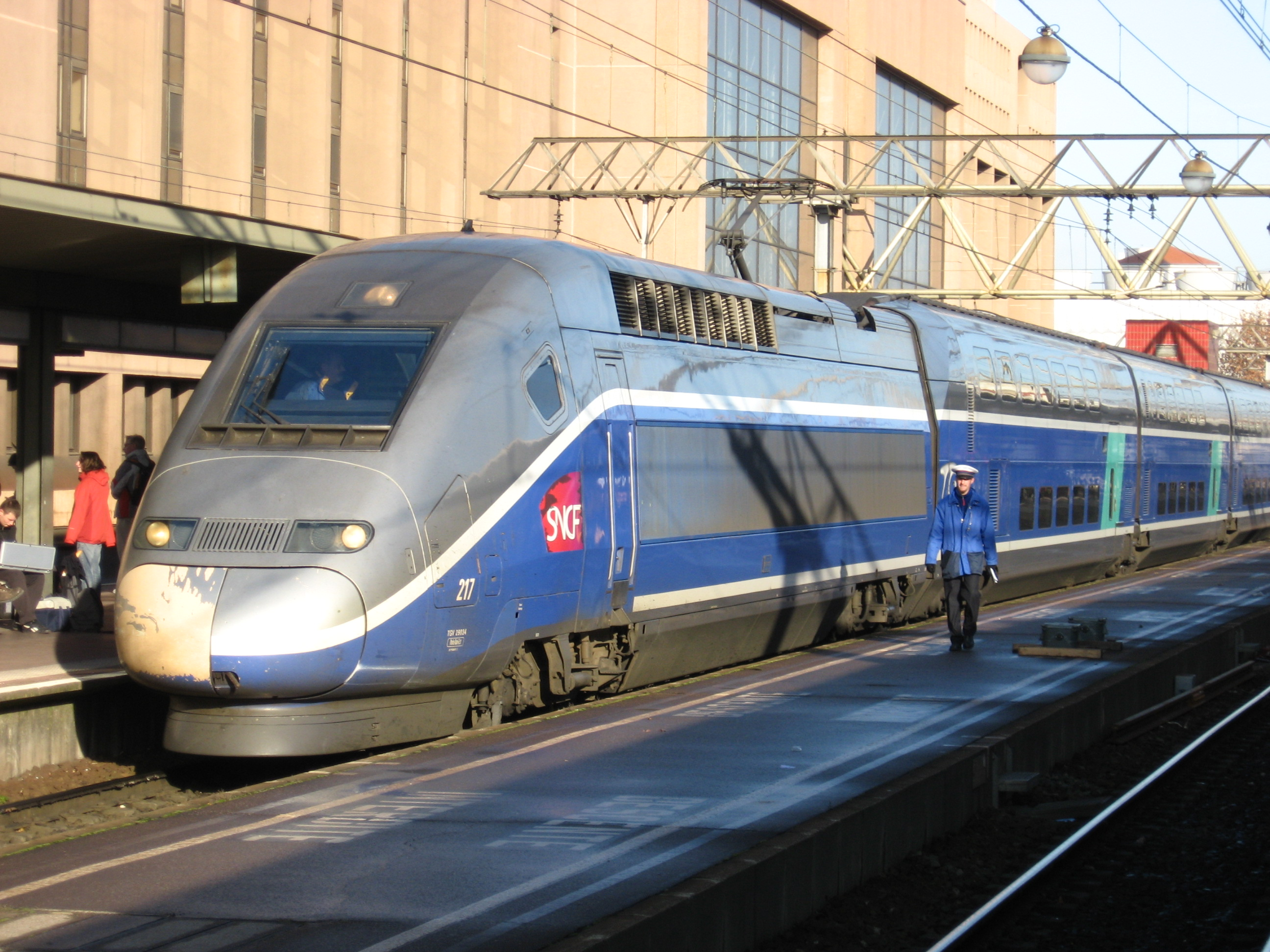 Een duplex TGV in Lyon Part-Dieu